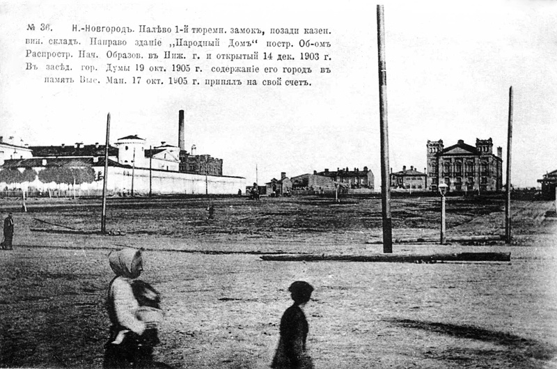 Острожная площадь. Нижний Новгород